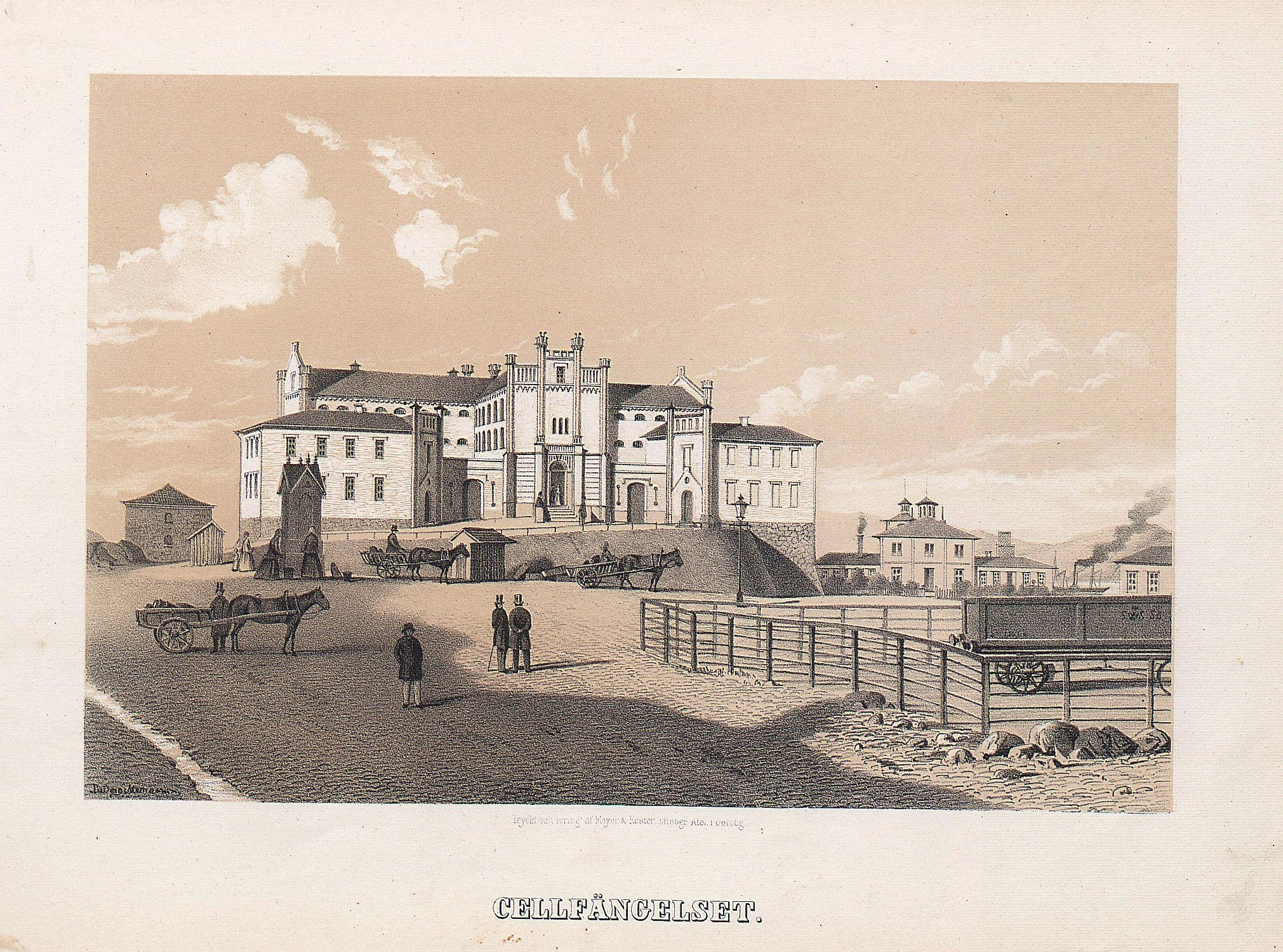 Göteborg länscellfängelse (1857-1907)